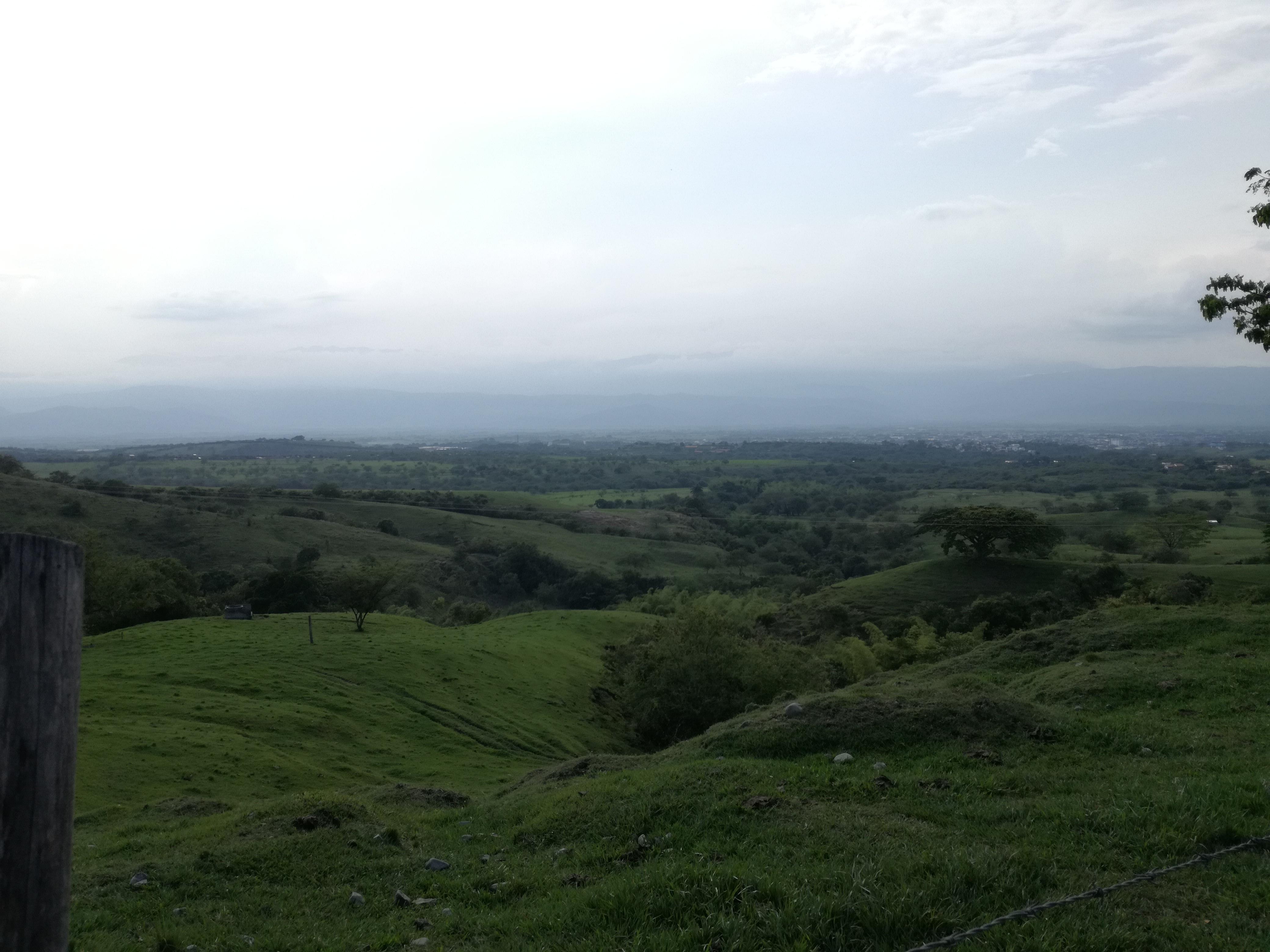 fotografía tomada desde las estribaciones de la cordillera central